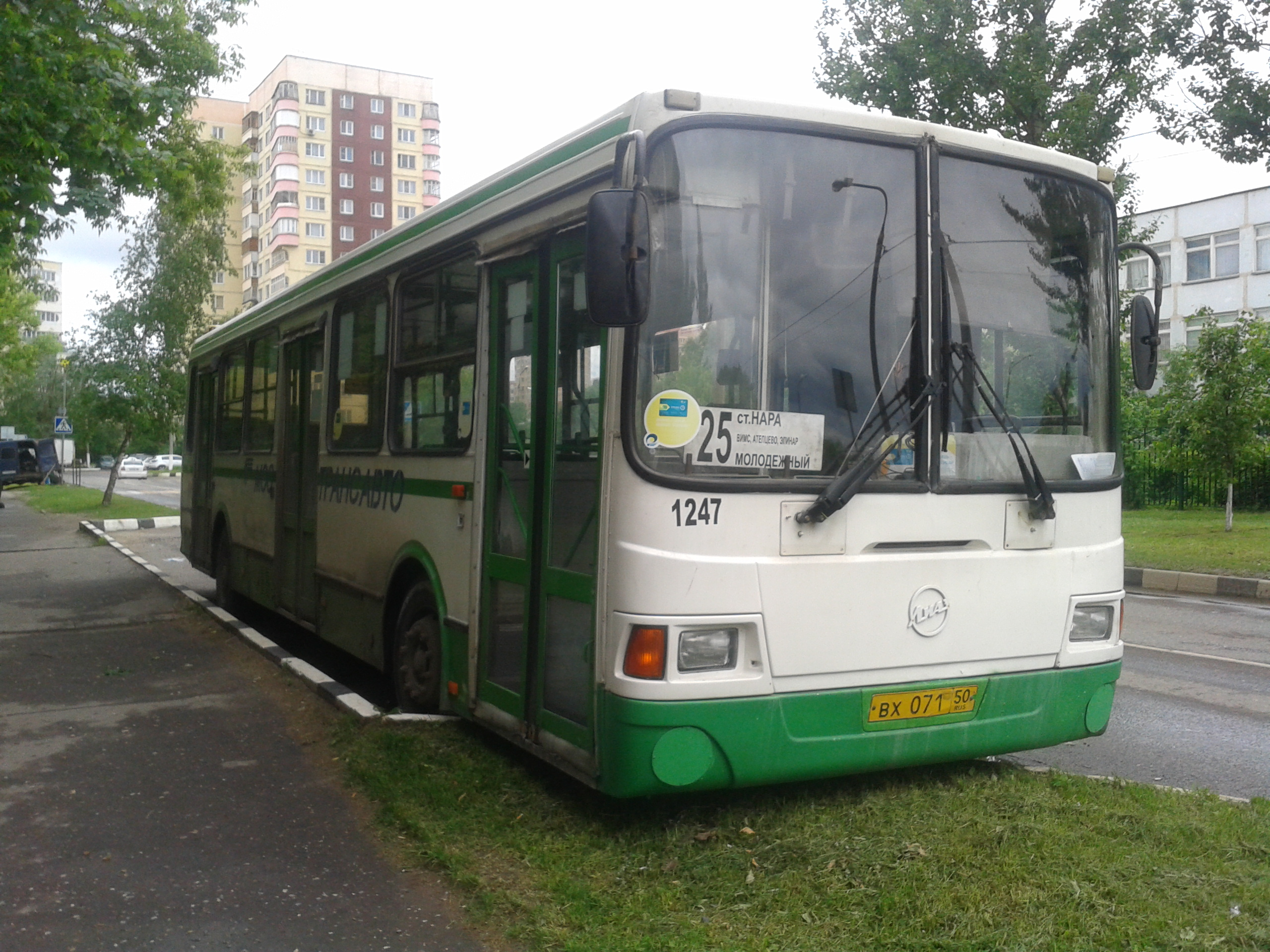 ЛИАЗ-5256.25 Наро-Фоминского ПАТП Мострансавто